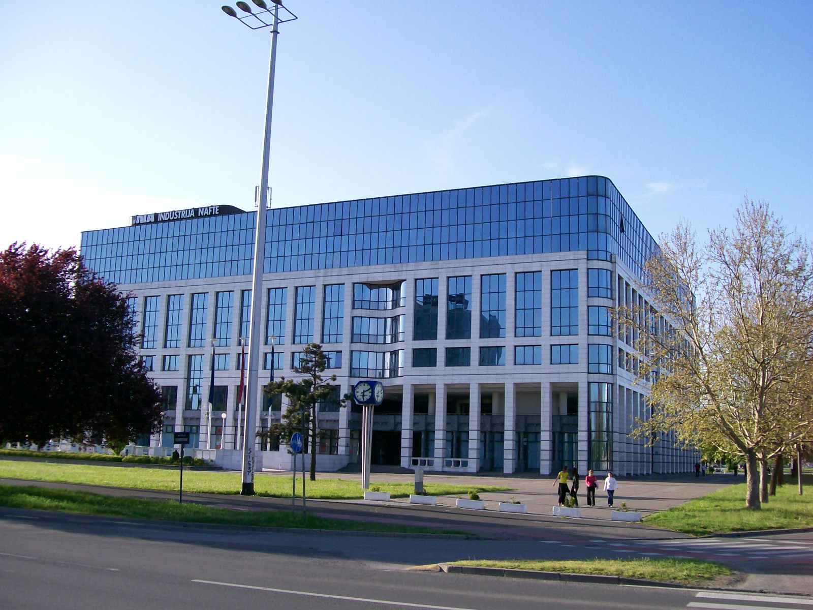 Upravna zgrada INA-e u zagrebu, tzv. Karingtonka